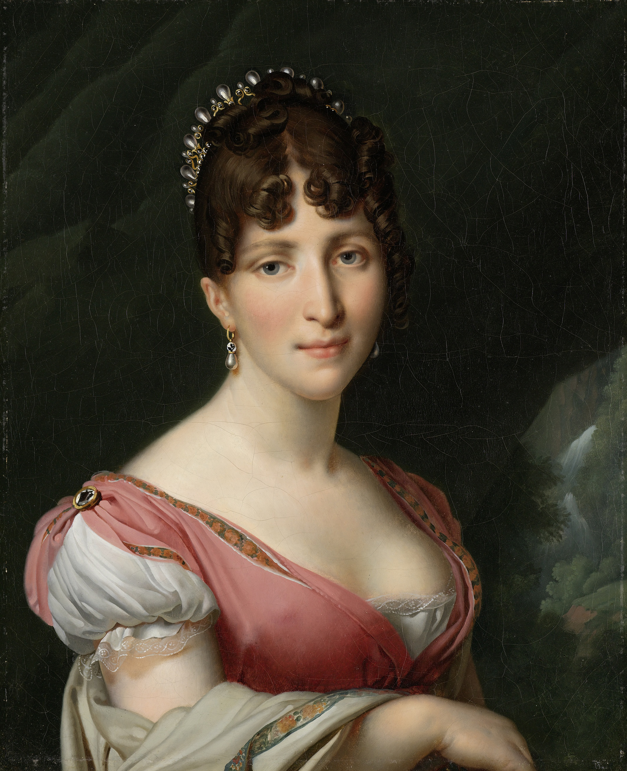 Portret van Hortense de Beauharnais, koningin van Holland, echtgenote van Lodewijk Napoleon, koning van Holland. Buste naar rechts met een kroontje in het haar, rechts een landschapje met een waterval.; Anne Louis Girodet-Trioson (1767-1824), Parijs, 1805-1809, olieverf op doek